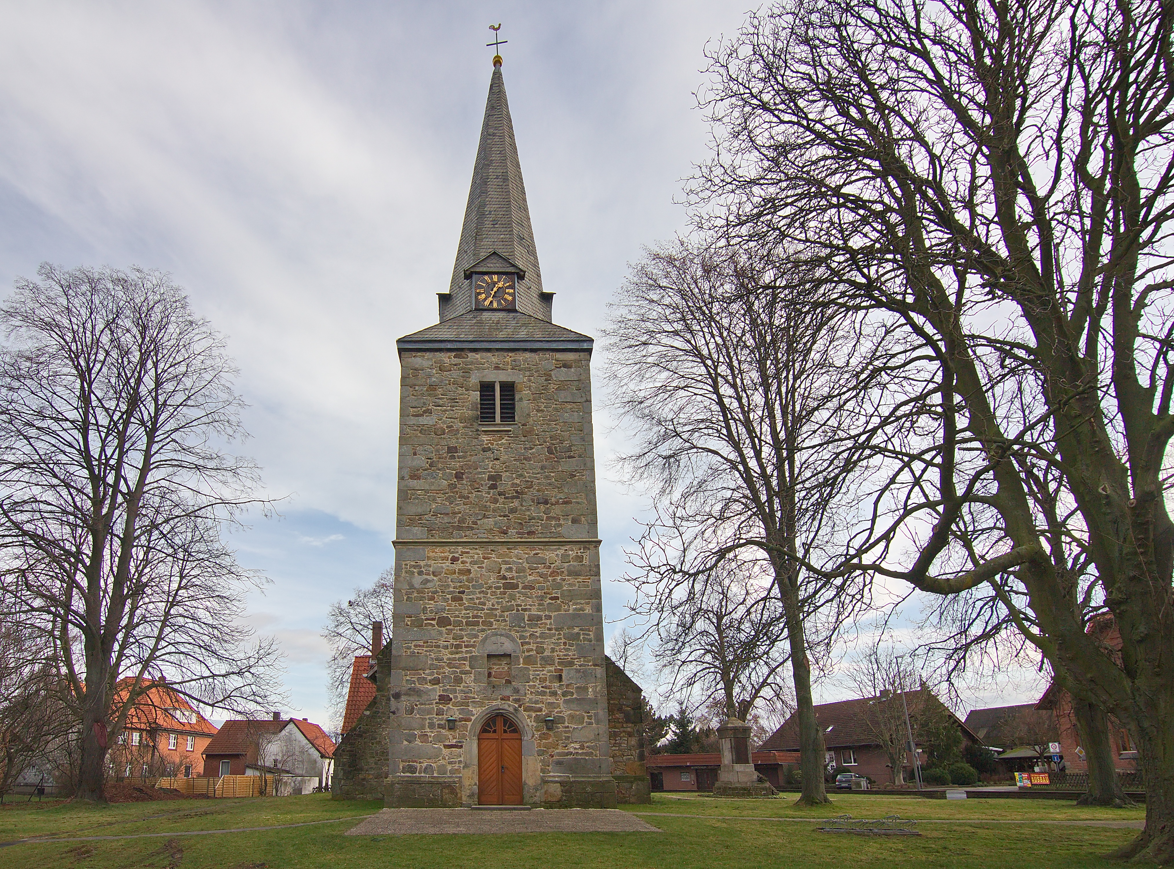 Heilig-Kreuz-Kirche in Kirchdorf (Barsinghausen), Niedersachsen, Deutschland